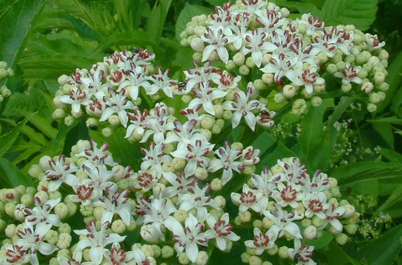 Sureau hièble, photo J.F. Gaffard, Bucey-lès-Gy, juin 2004